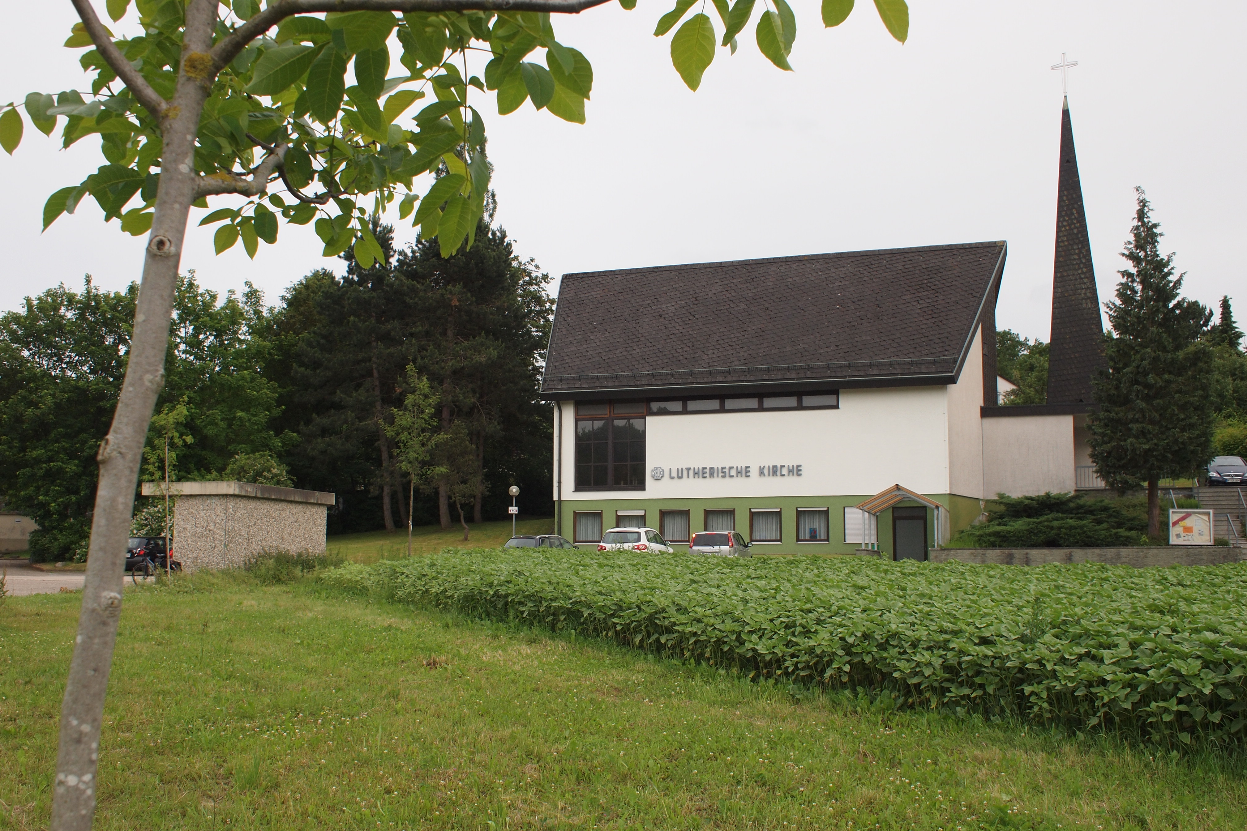 Kirche der selbständig-lutherischen Dreieinigkeitsgemeinde in Wilferdingen